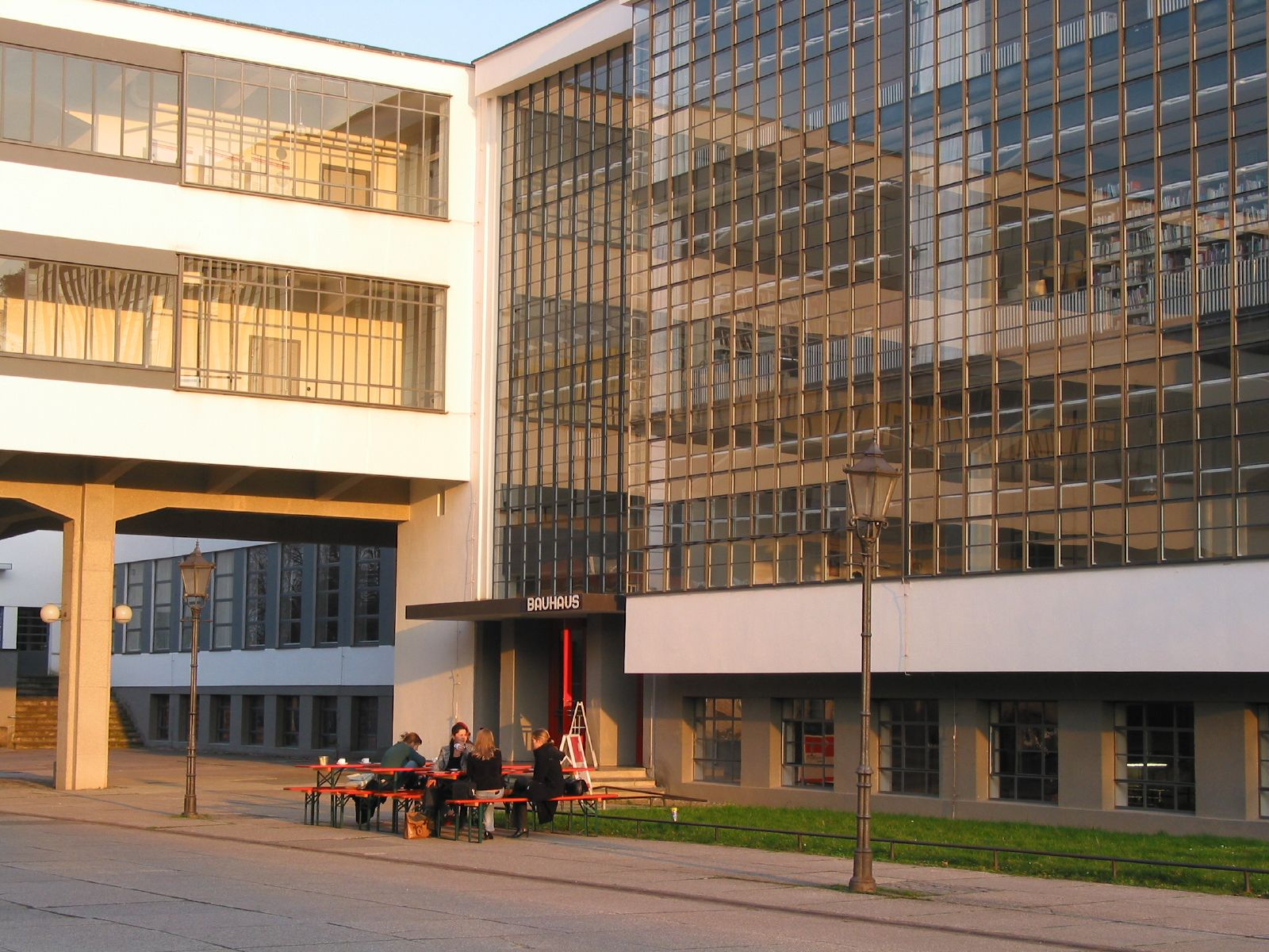 Bauhaus in DessauBauhaus in Dessau